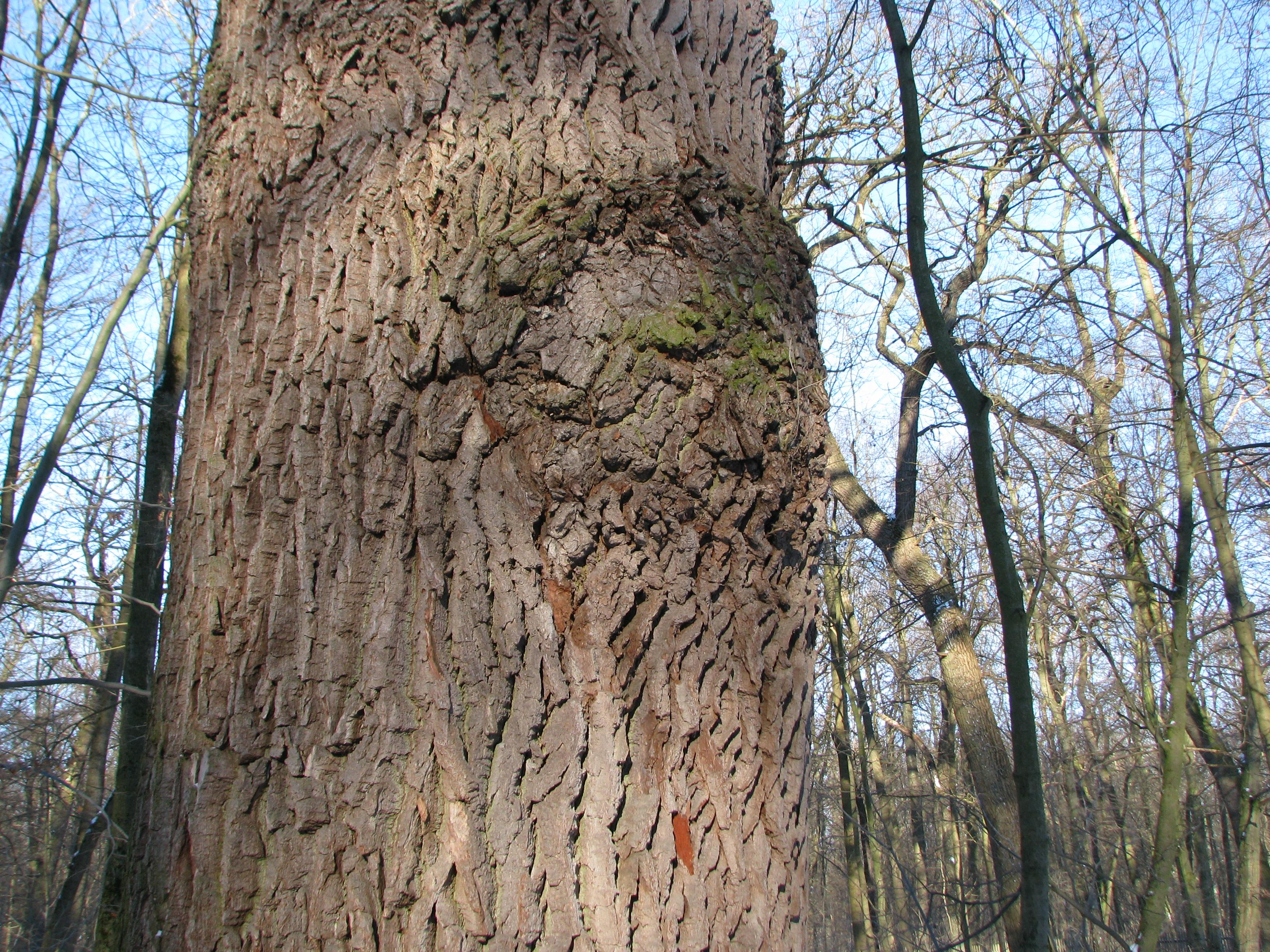 Dicke Eiche an der Thiemsburg im Nationalpark Hainich, Detail des Stammes.